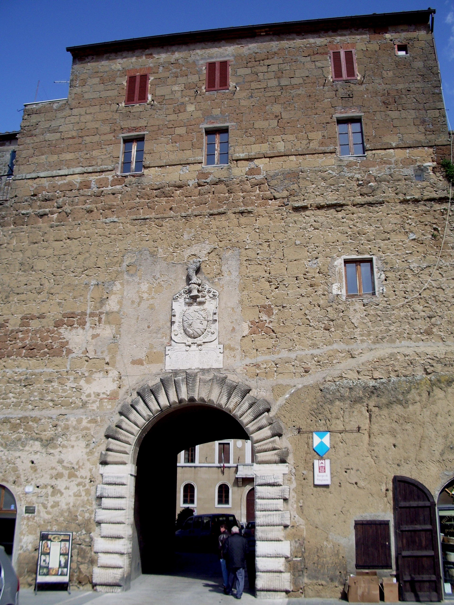 La Porta della Cittadella lungo le Mura di Pitigliano